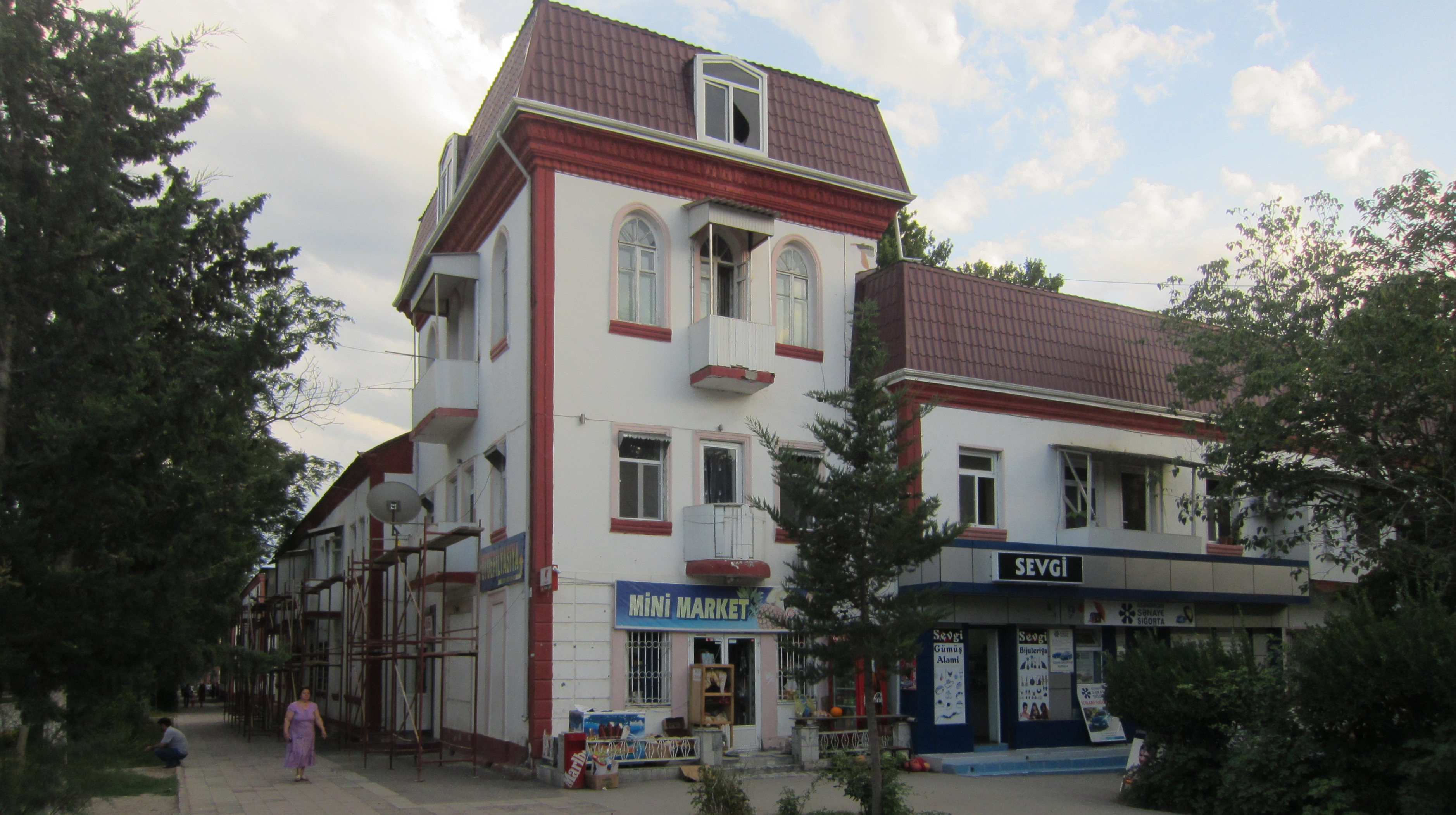 Alman hərbi əsirlərin Mingəçevirdə tikdikləri ev